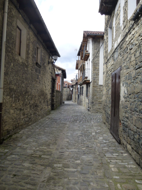 Gardeko kale bat